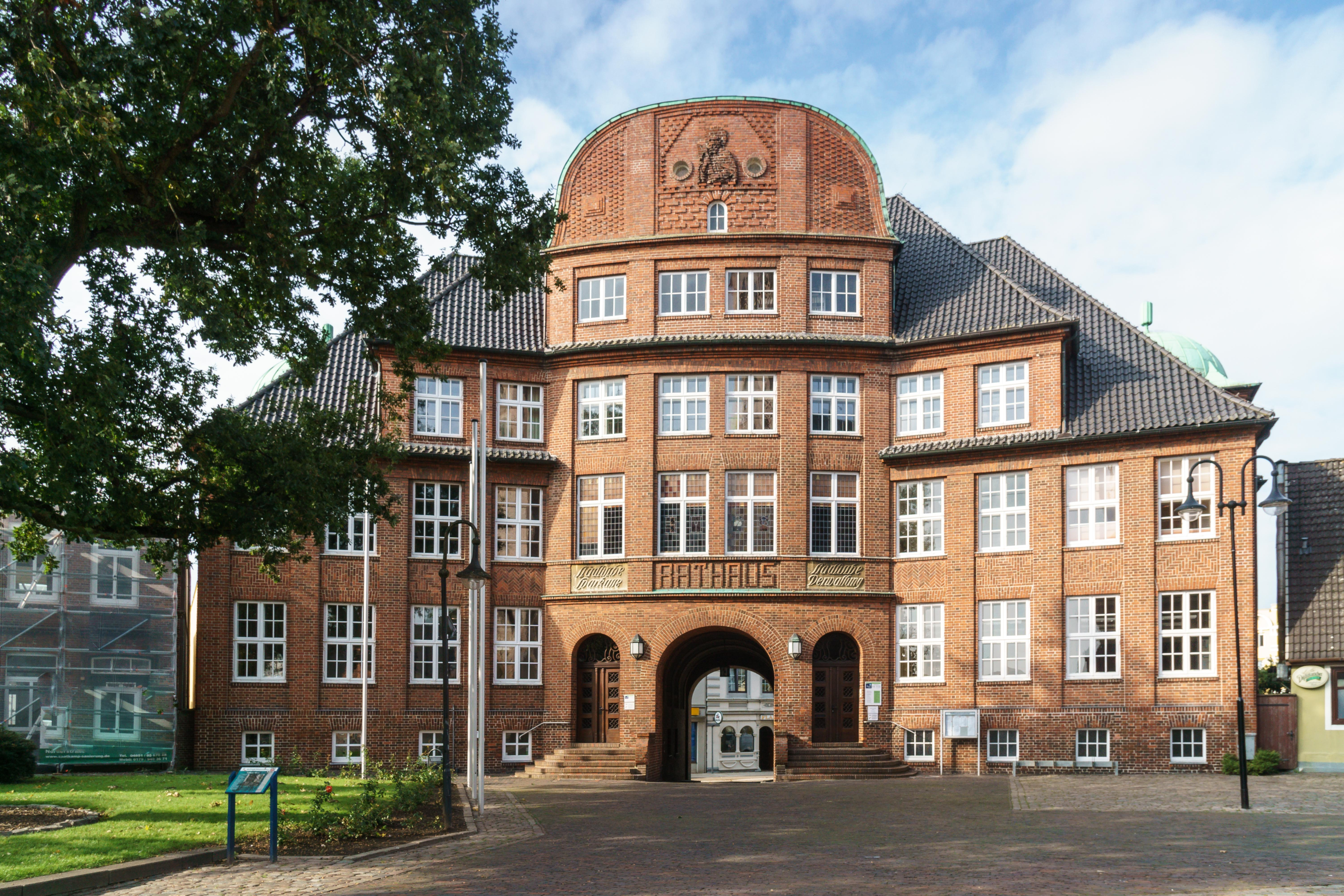 Rathaus in Marne (Holstein), Alter Kirchhof 4/5